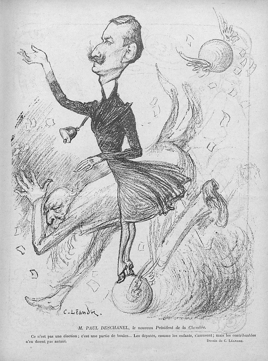 Dessin de Charles Léandre, publié dans Le Rire, faisant état des tensions ayant entouré la victoire de Paul Deschanel (debout) sur Henri Brisson (courbé) lors de l'élection pour la présidence de la Chambre des députés.